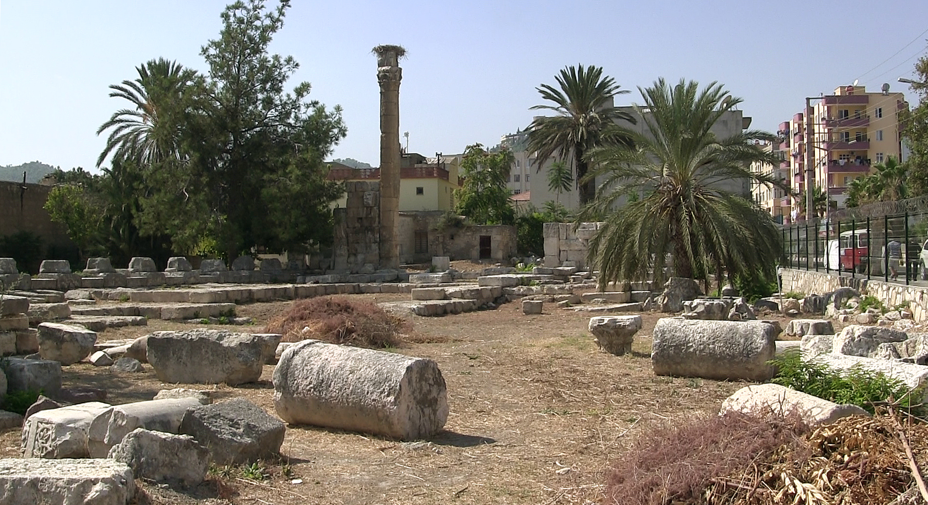 Römischer Tempel in Silifke (Seleukia am Kalykadnos), Südtürkei